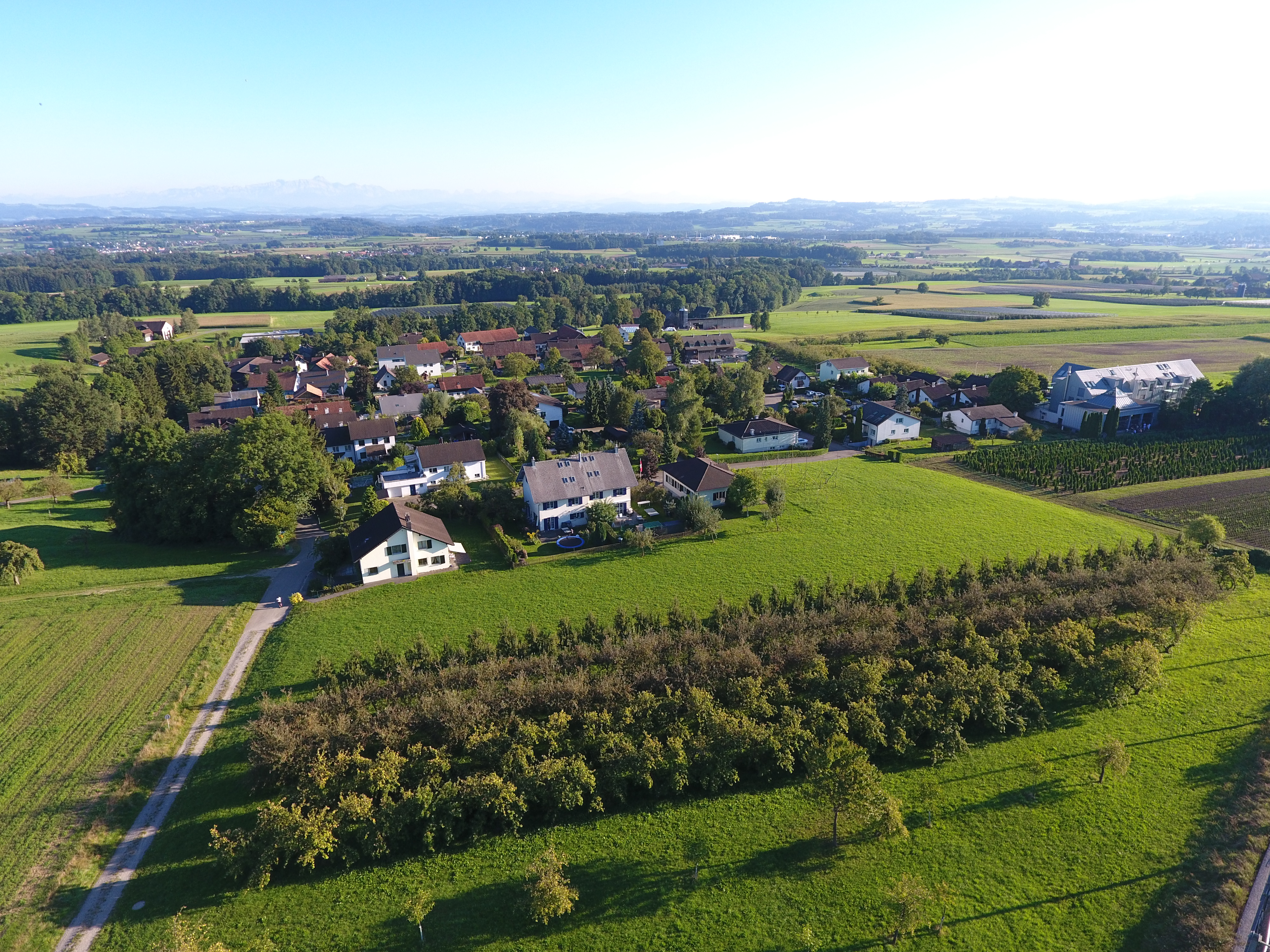 Betrachtung von Guntershausen aus nördlicher Richtung